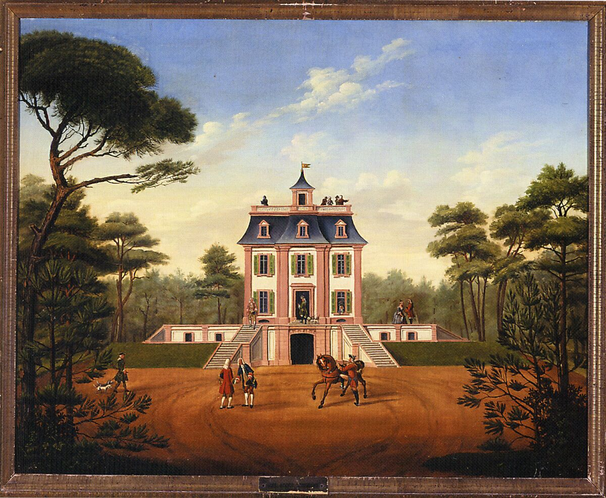 Griesheimer Jagdlusthaus